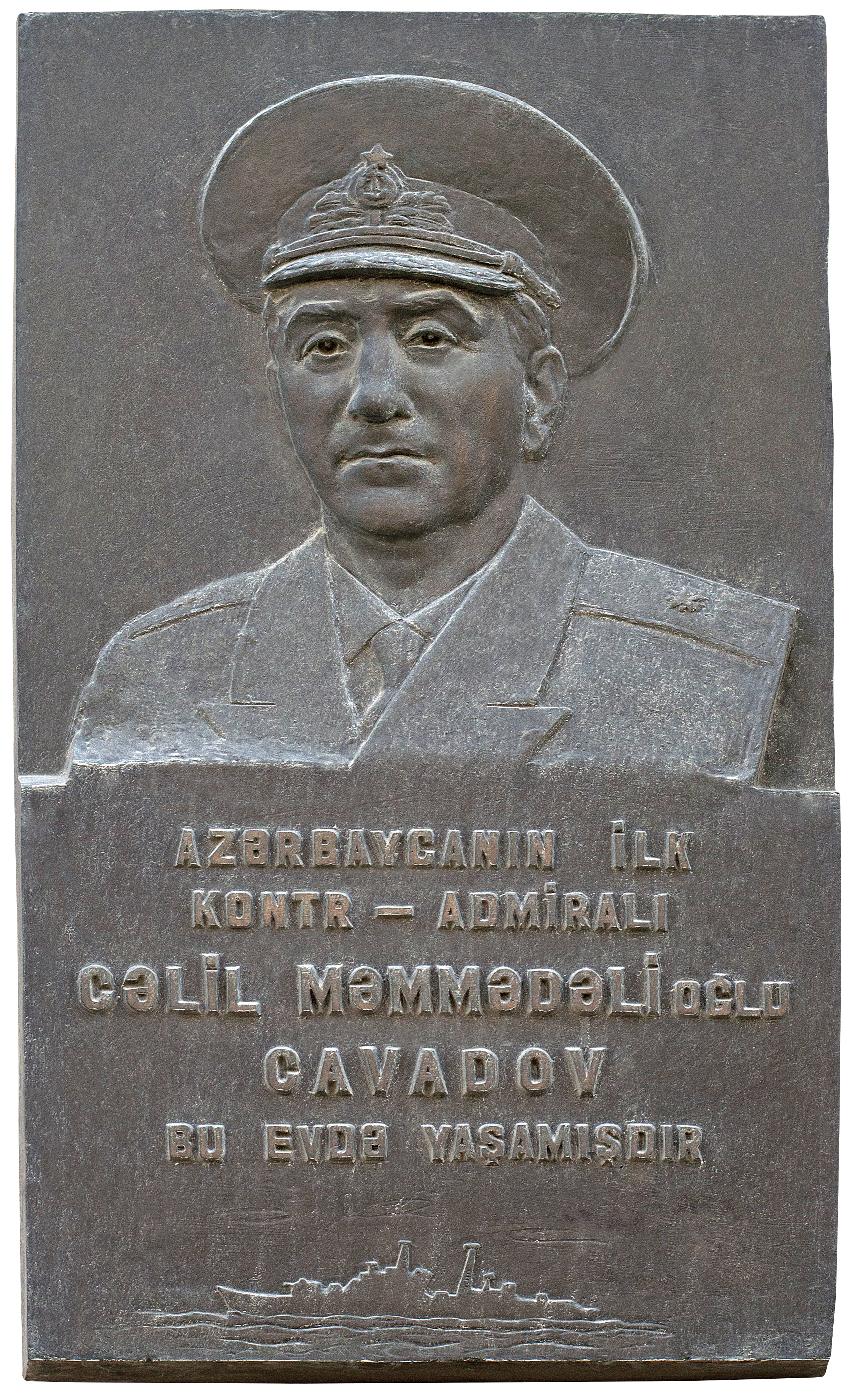 Cəlil Cavadovun xatirə lövhəsi